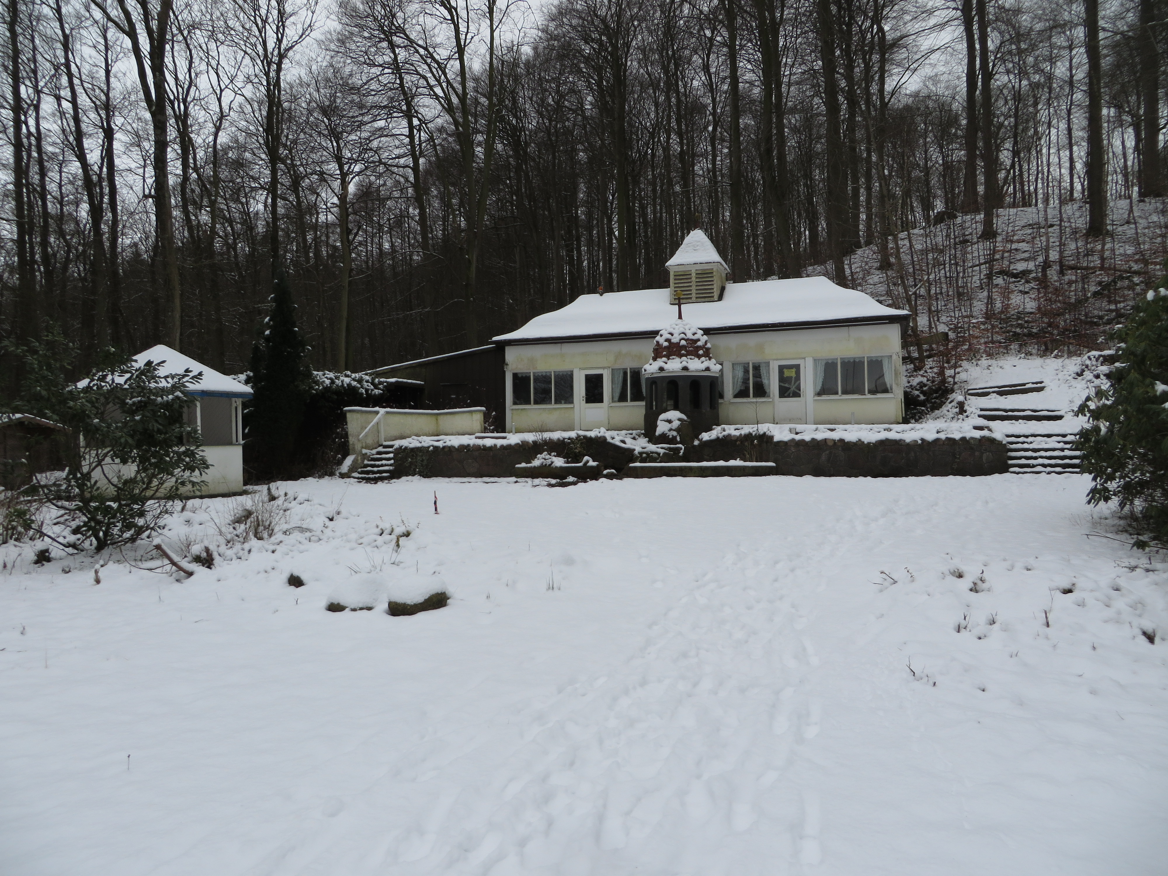 Ausflugslokal Quellental im Schnee (Glücksburg 3 Februar 2015), Bild 04